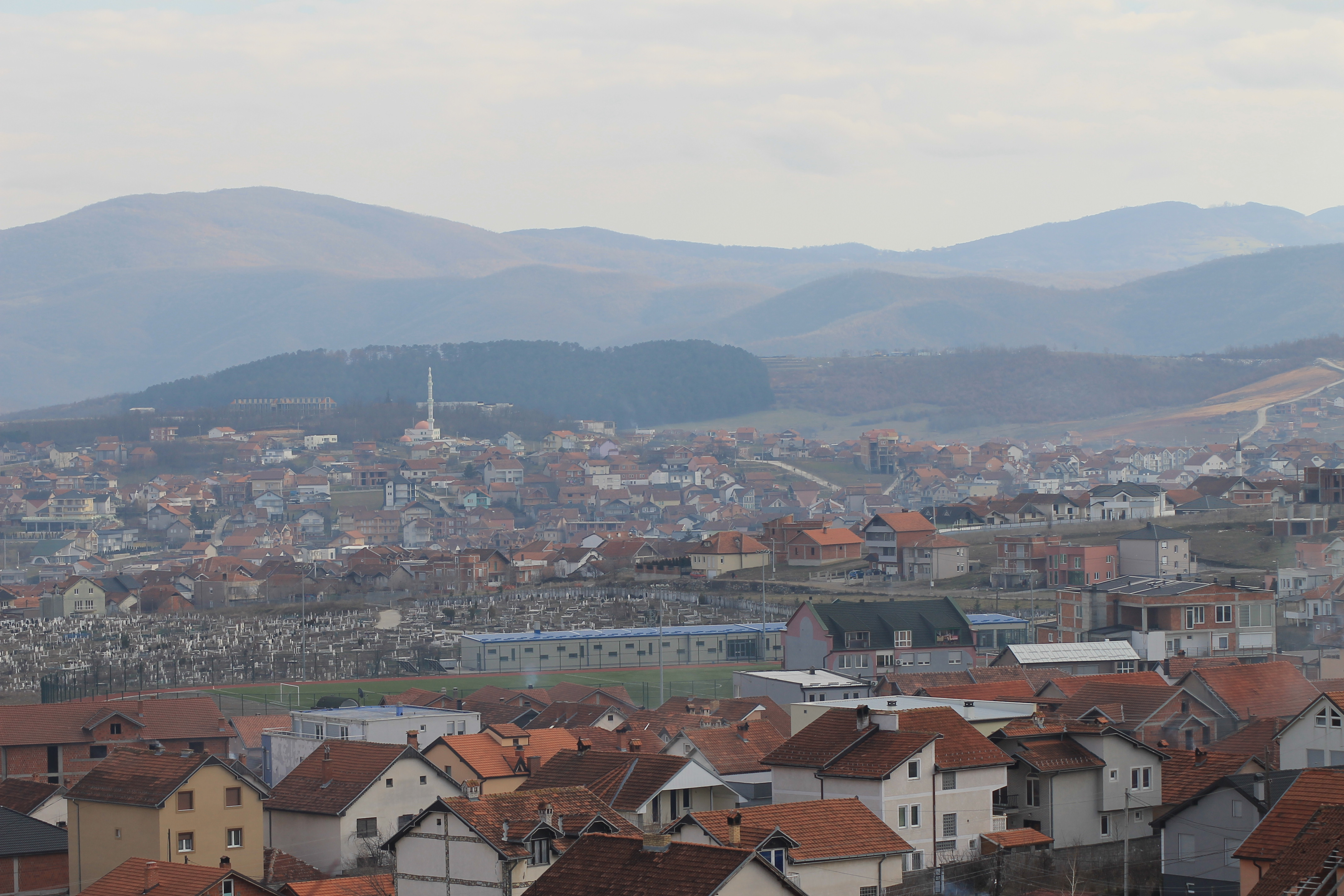 Lagjja Arbëria ndryshe njihet si Qenar Qeshmja.